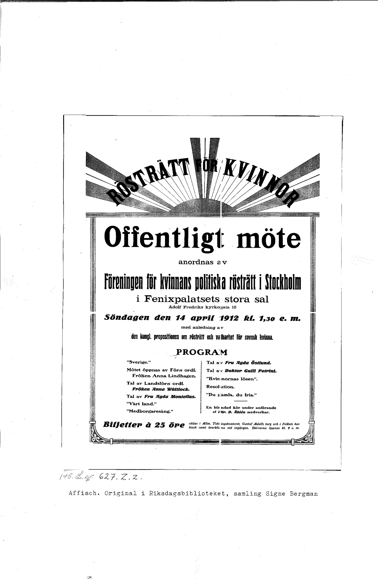 Affischering om offentligt möte som anordnas av Föreningen för kvinnans politiska rösträtt i Stockholm